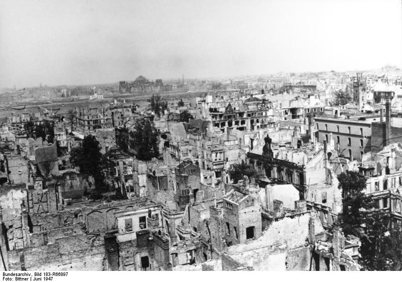 Berlin, Zerstörungen im Bezirk Tiergarten ADN-ZB/Bittner Berlin Blick vom Shellhaus in der Bendlerstr. Ecke Königin-Augusta-Straße auf den im II. Weltkrieg zerstörten Bezirk Tiergarten. Im Hintergrund der Reichstag. Rechts im Bild der Turm der zerstörten St. Matthaeikirche (Westberlin) Aufn. Juni 1947